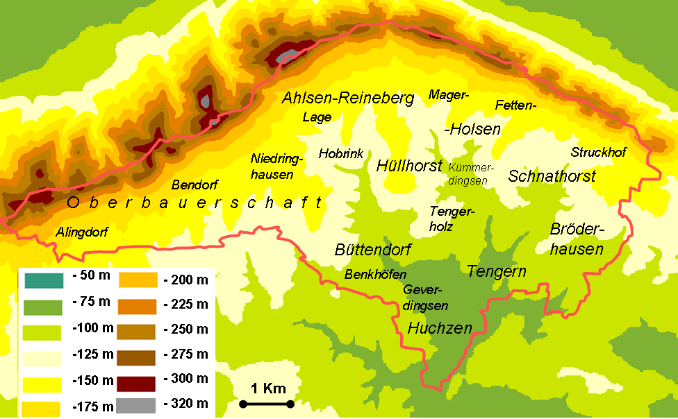 Topographie der Gemeinde Hüllhorst